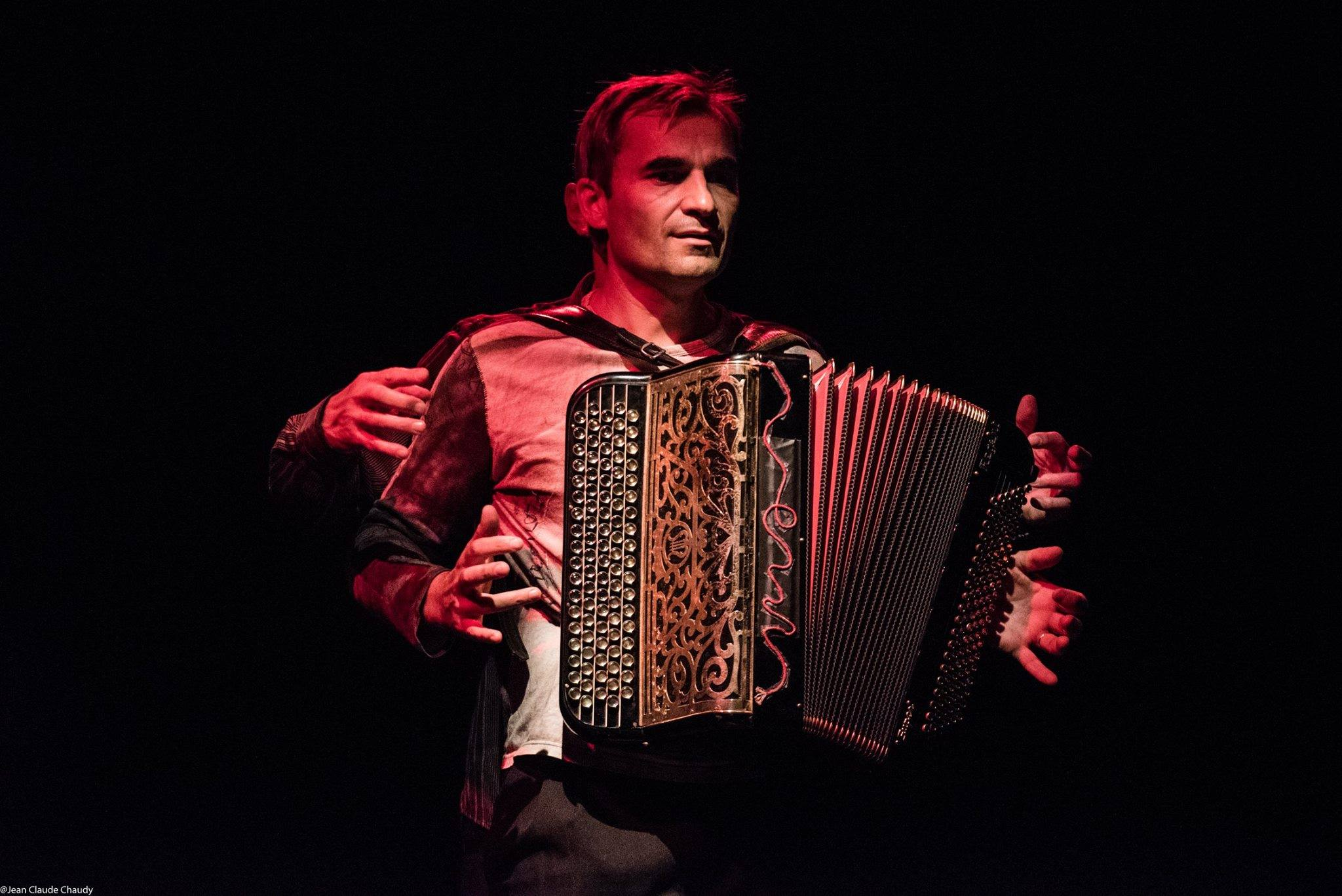 Arnaud Nano Méthivier lors de KRAFT.